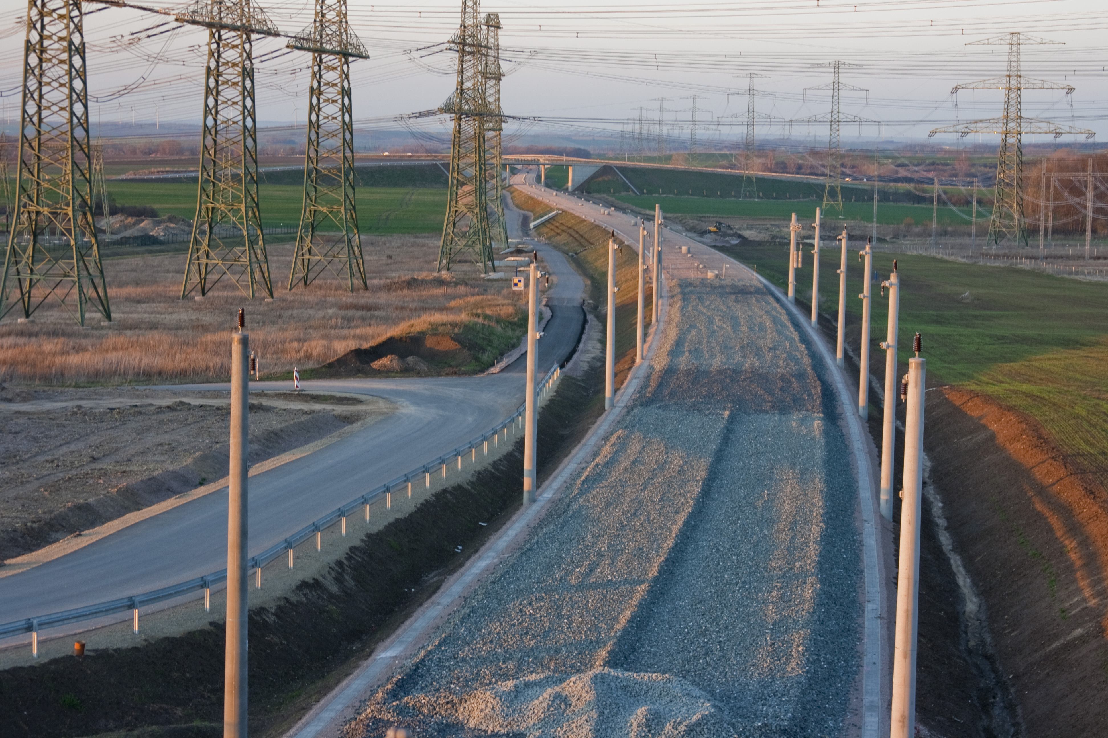 Neubaustrecke Erfurt - Leipzig-Halle - NBS km 196